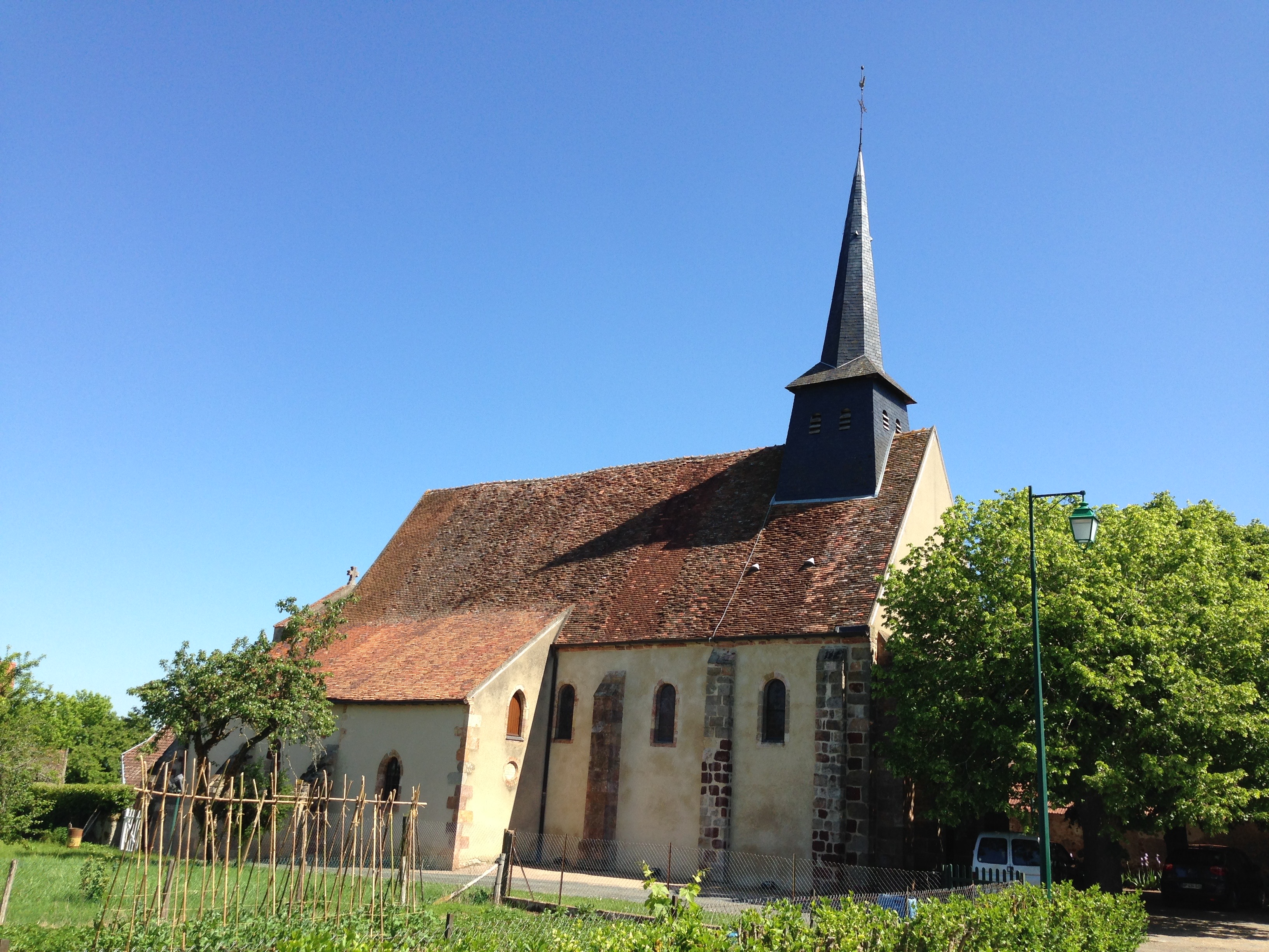 Saint-Vitte Église vue du nord-ouest